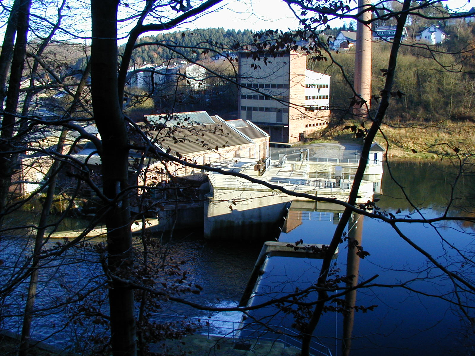 Wehr und Turbinenhaus der Staustufe Radevormwald-Dahlhausen.